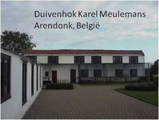 duivenaccomodatie Karel Meulemans Arendonk - Belgie